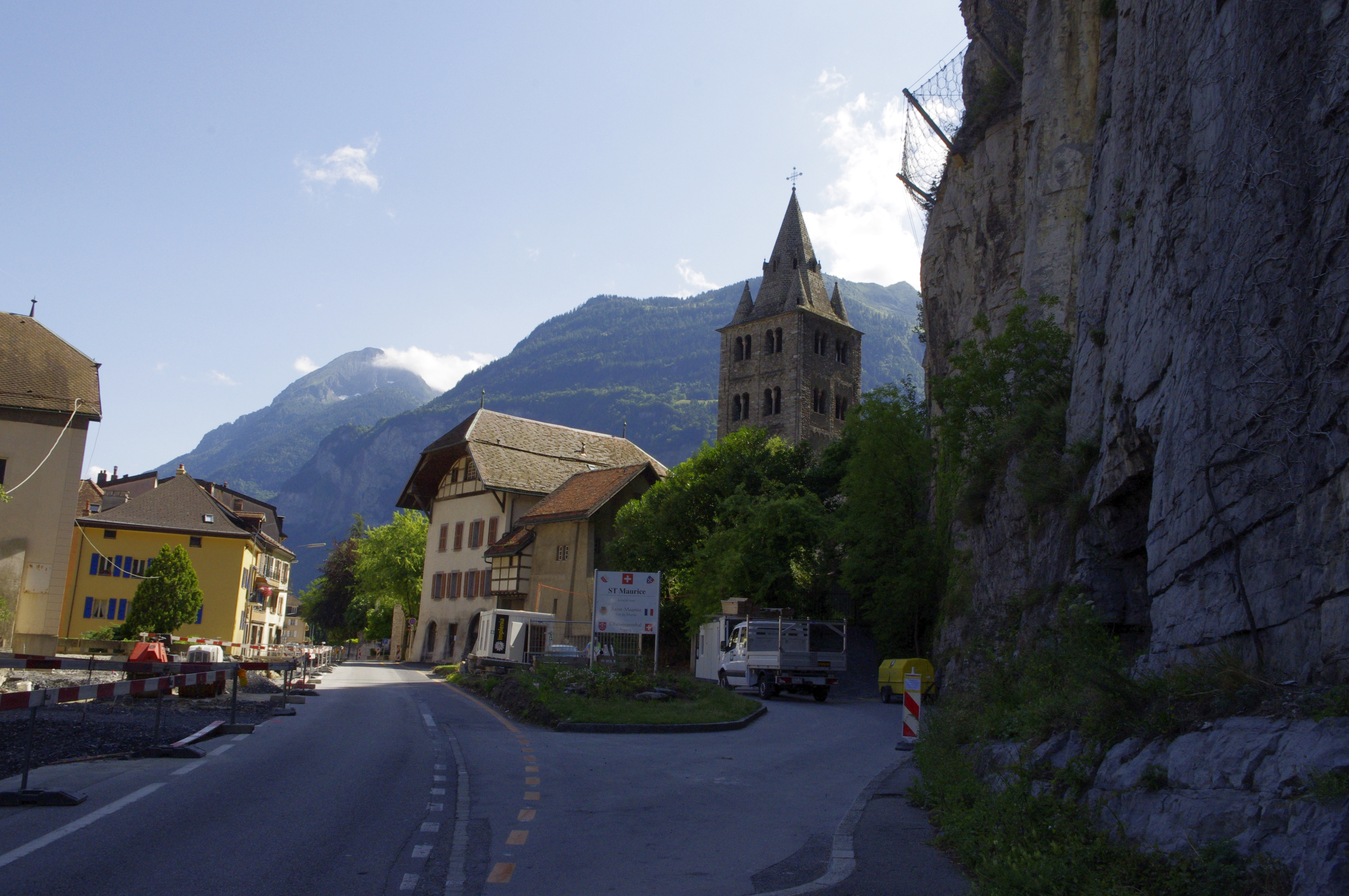 Saint-Maurice, Wallis, Schweiz